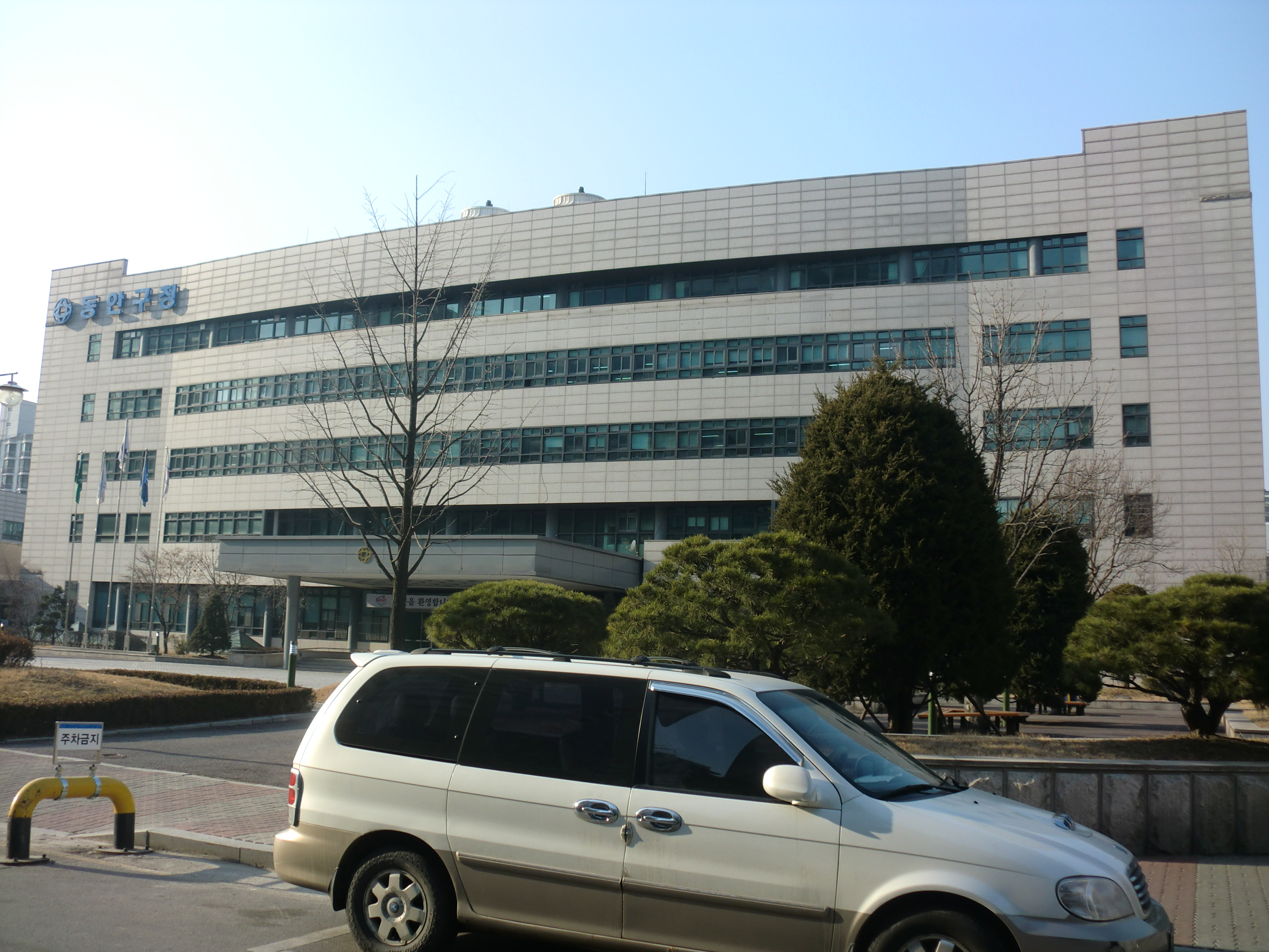 경기도 안양시 동안구에 있는 동안구청